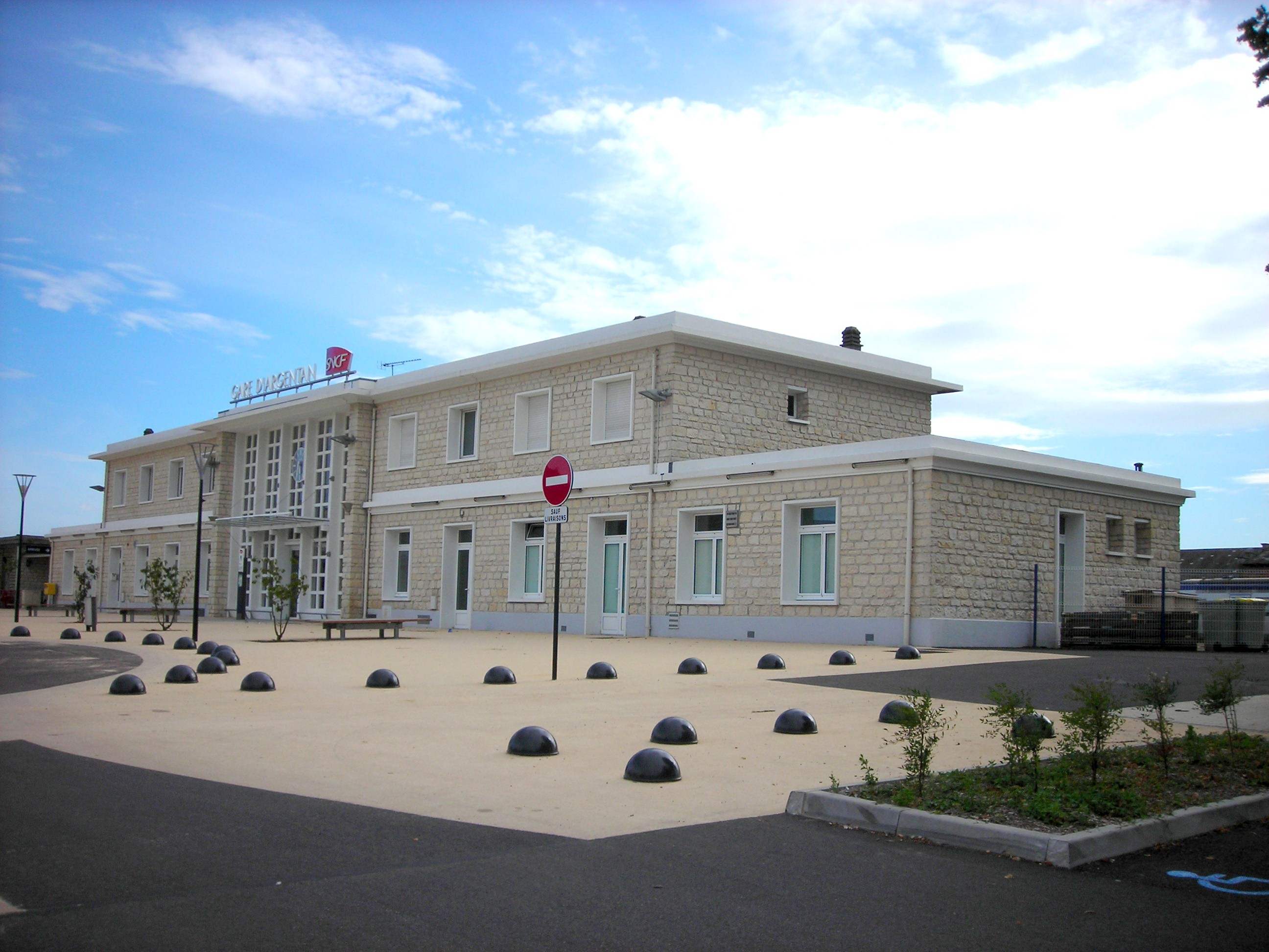 Vue extérieure de la gare d'Argentan (Orne, France)